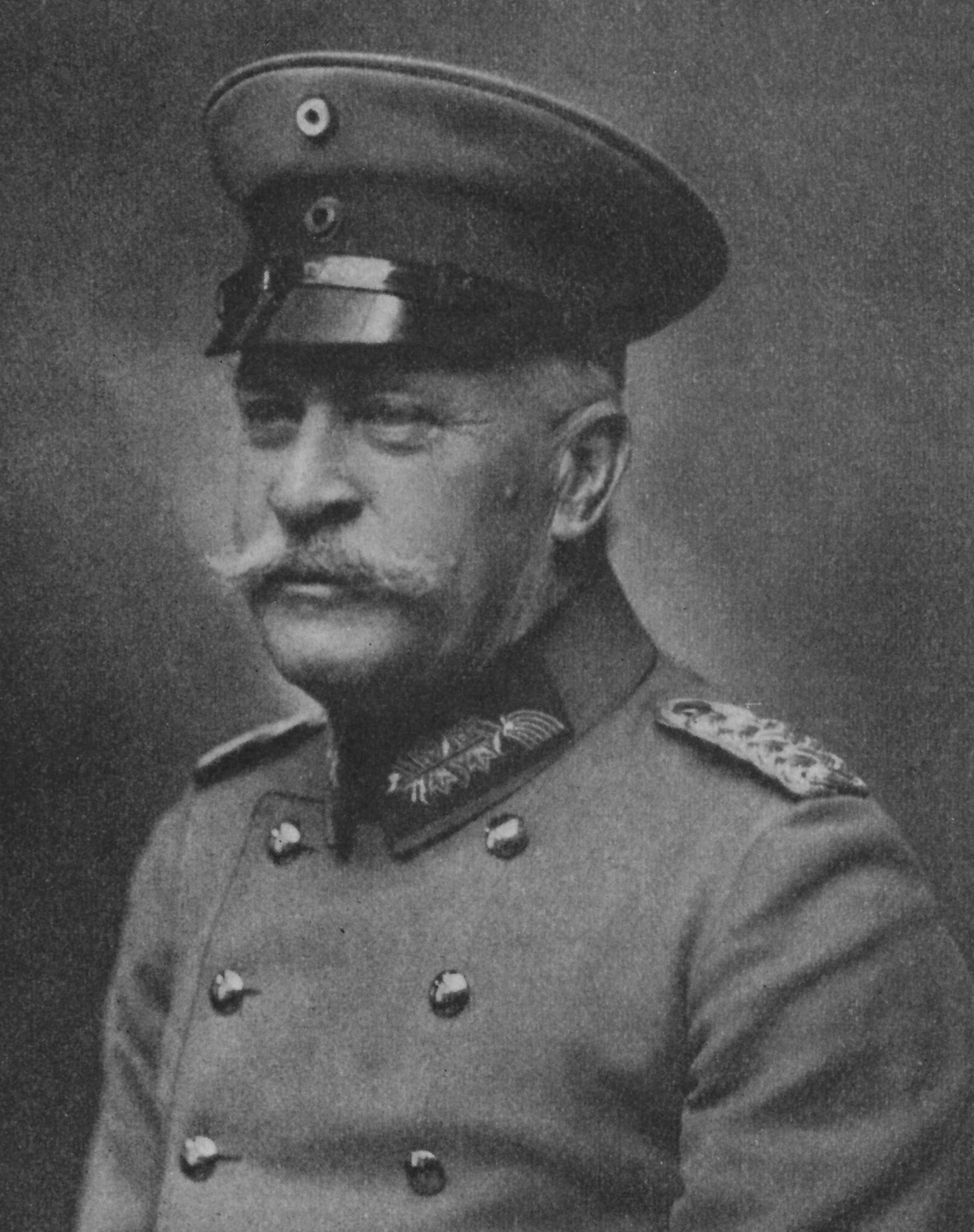 Friedrich von Schippert (1858-1924), Generalleutnant